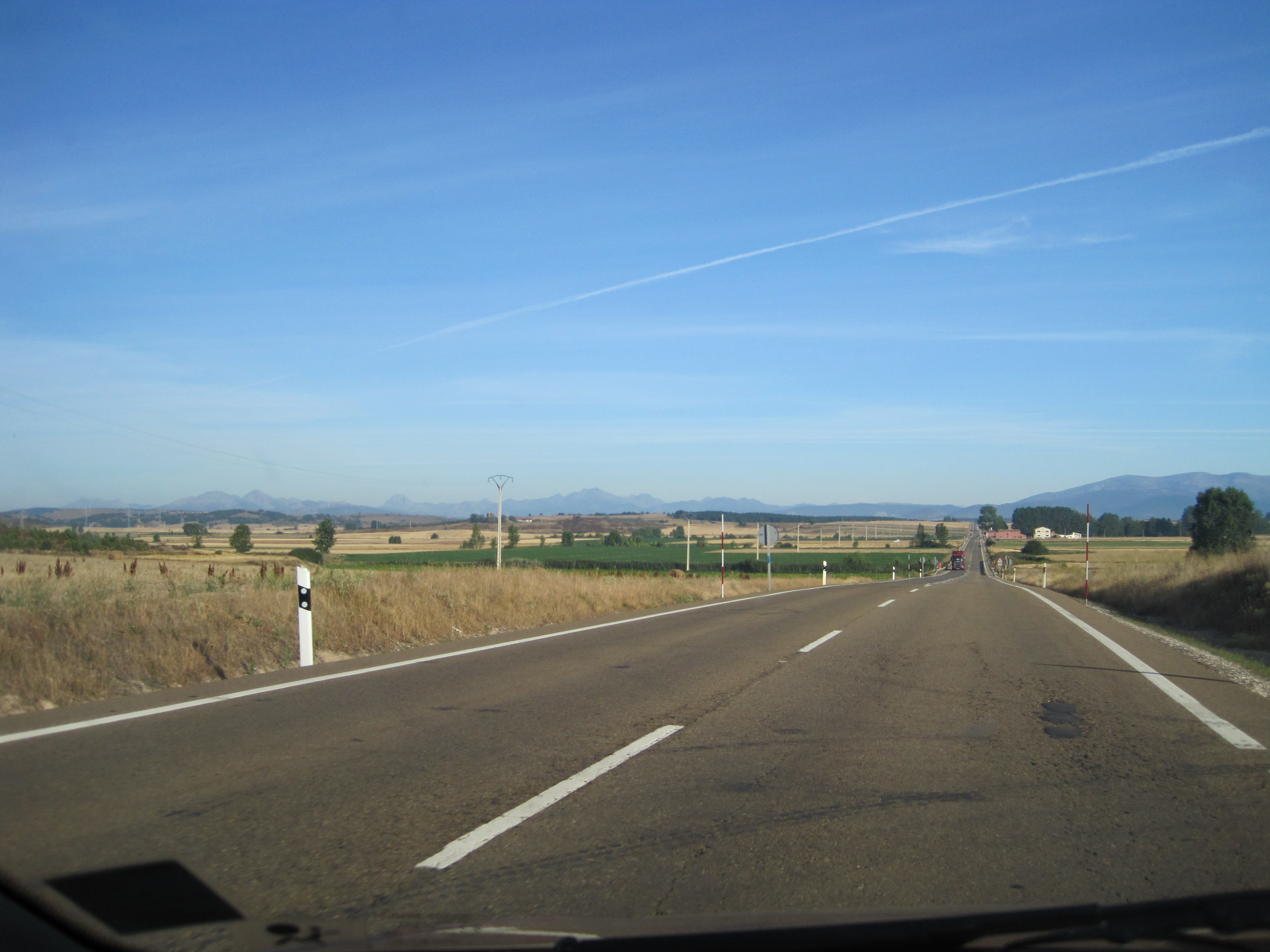 N-627 en la larga recta cerca de Aguilar.